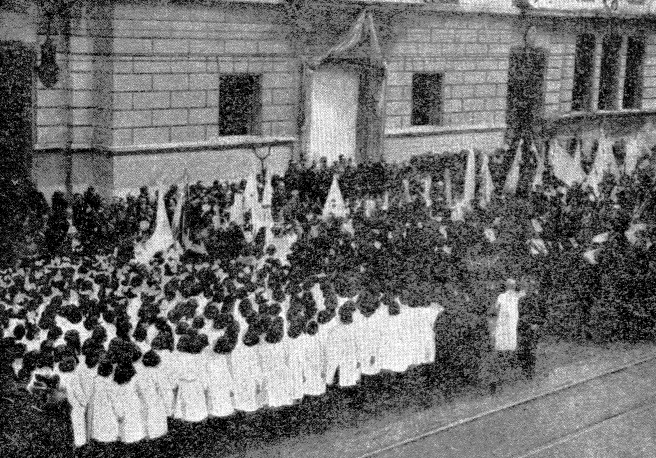 Inauguración de la Puerta Historiada. Argentina.Buenos Aires. Av. Entre Ríos 1346